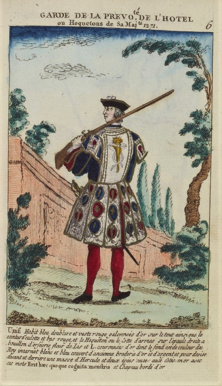 Vue extraite de l'ouvrage de Claude-Antoine Littret de Montigny : Uniformes militaires, où se trouvent gravés en taille-douce les uniformes de la Maison militaire du Roi, publié en 1772.